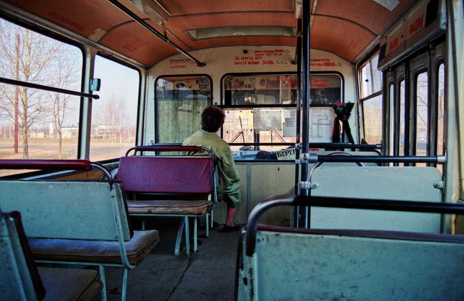 Автобус ЛиАЗ-677М, салон. Переславль-Залесский.